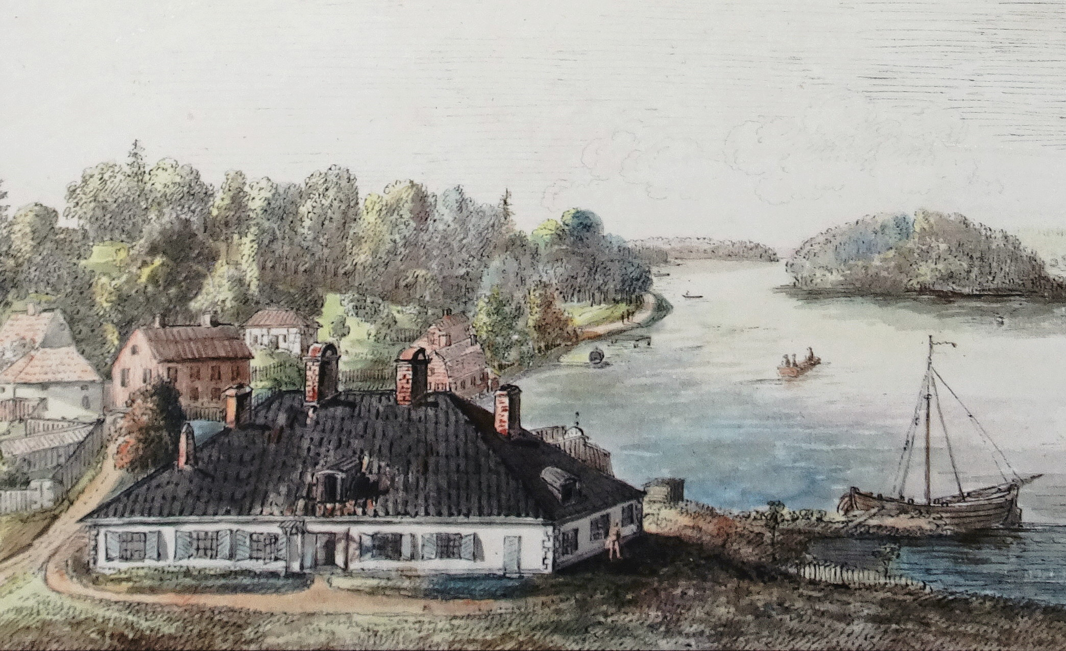 Ulriksdals slotts köksbyggnad